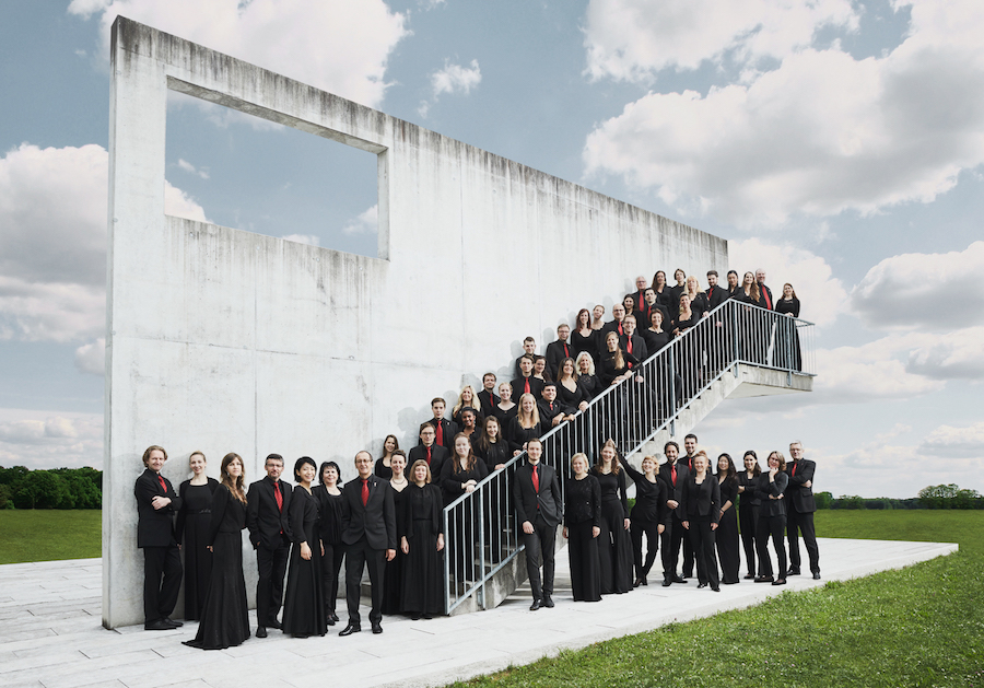 Bachchor Salzburg